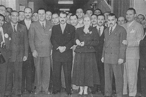 El Gobernador de Santiago del Estero Carlos Juárez, el Presidente Juan Domingo Perón y su esposa Eva Duarte de Perón "Evita" hacia 1949.